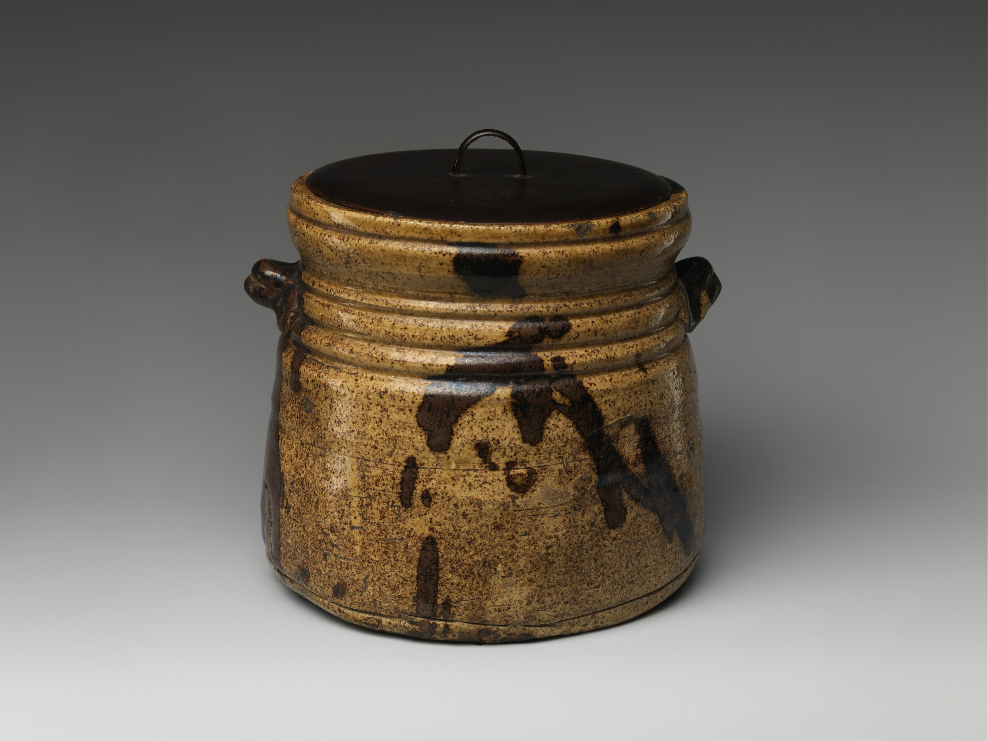 Japan; Water jar; Ceramics